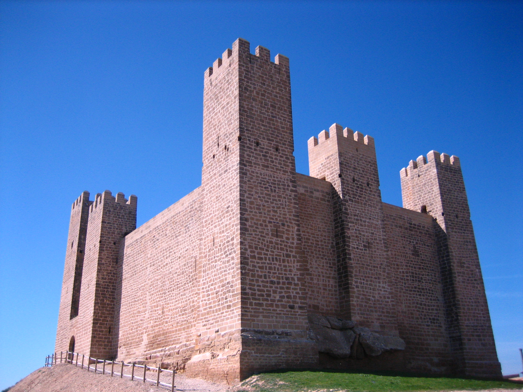 Aragonés: Castiello de Sadaba (Zinco Billas, Zaragoza, Aragón)